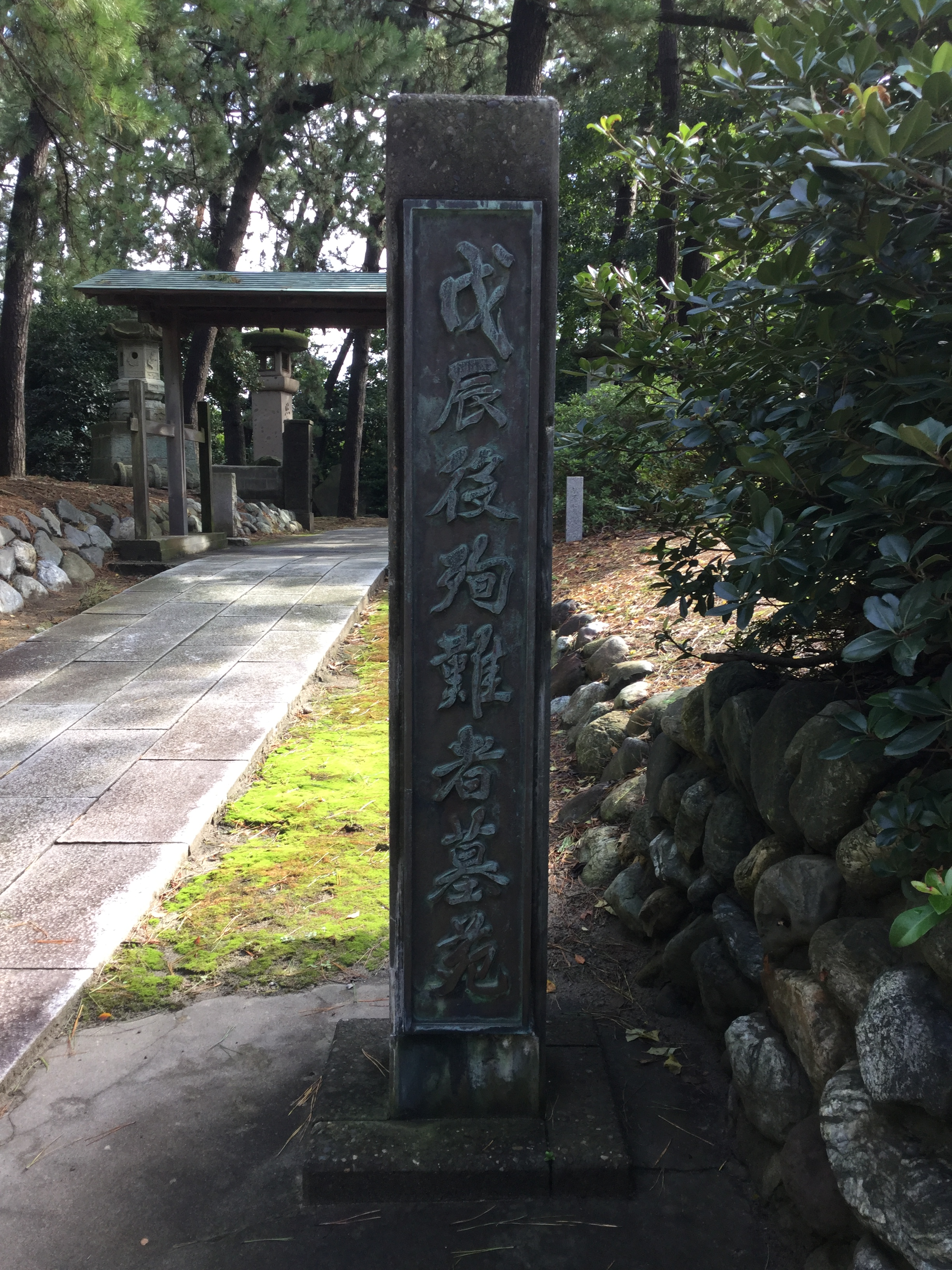 戊辰の役殉難者墓苑の入口